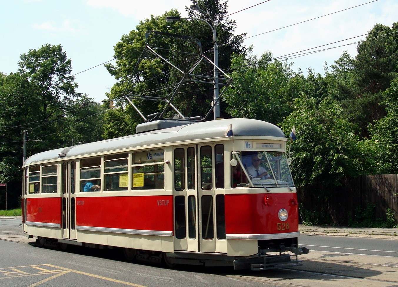 Historická tramvaj Tatra T1 v Ostravě